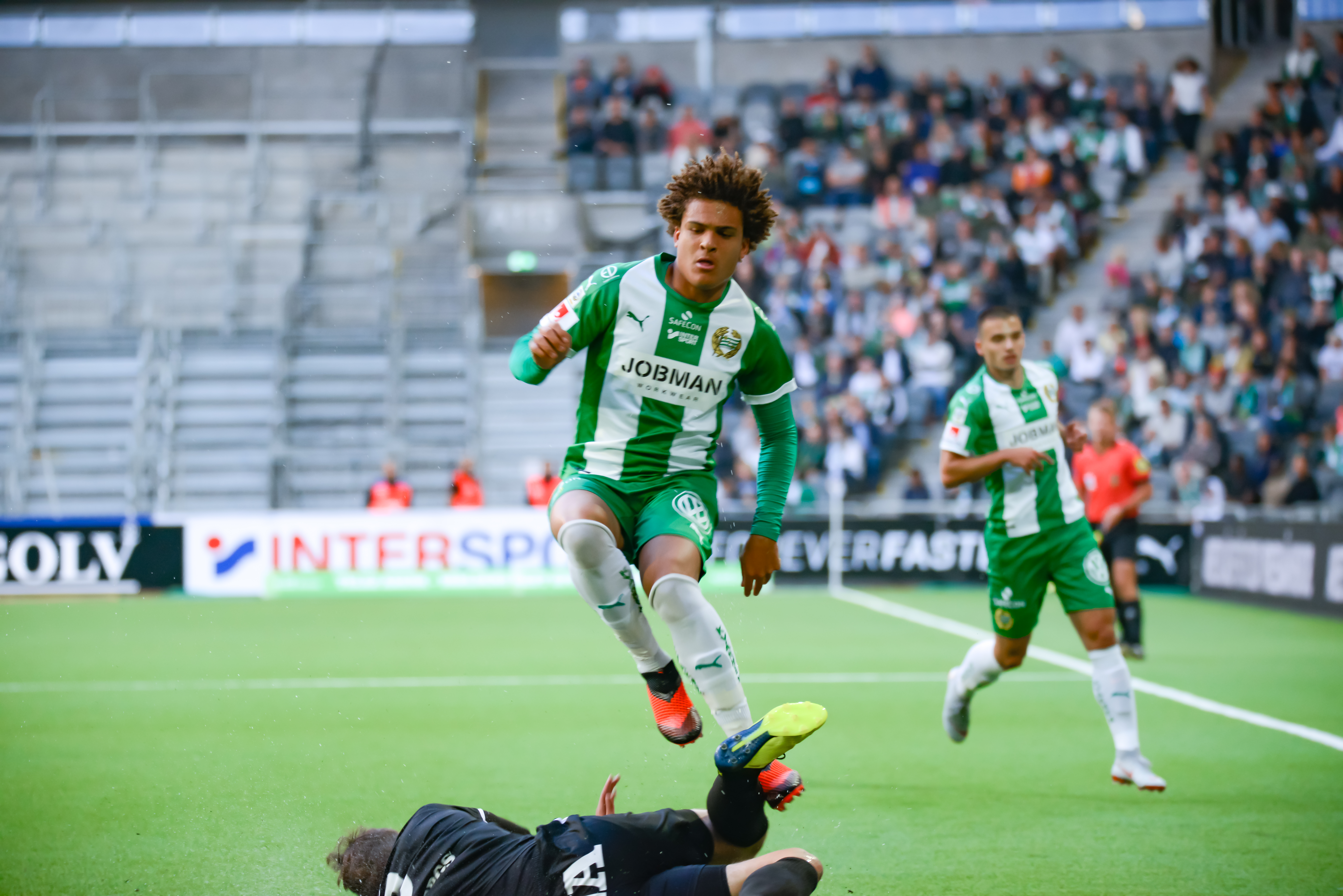 Hammarby-Örebro 2018-08-20. Vinst 2-0 till Bajen